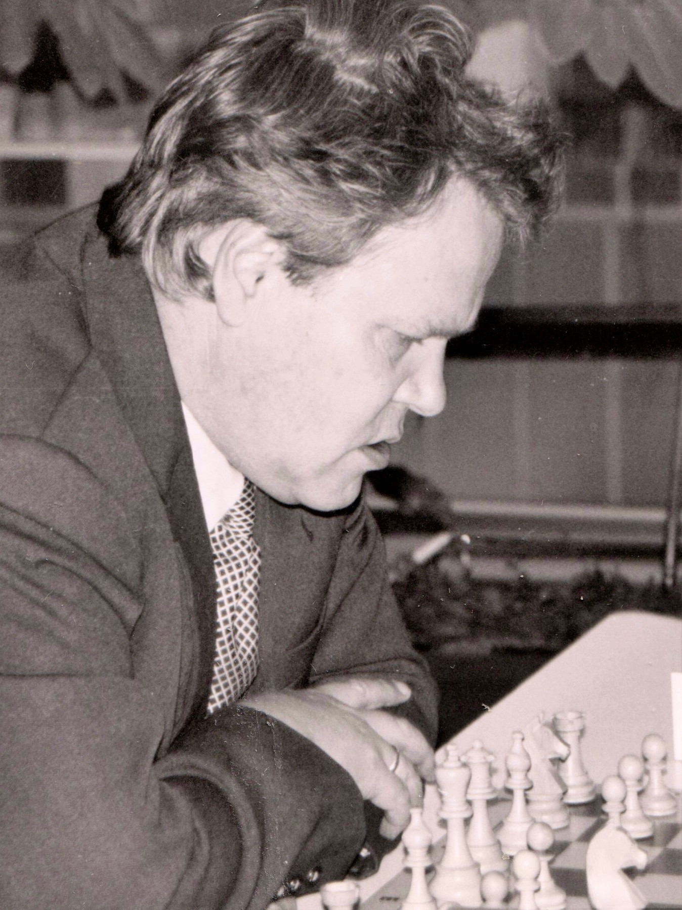 Burkhard Malich , deutsche Schachbundesliga Saison 1994/95, Partie gegen Lukas Brunner.